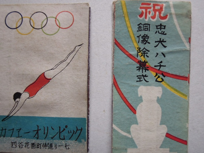 ハチ公像の除幕式に合わせ、当時のマッチラベル蒐集家が独自に製作したマッチラベル。 左は、同時代のカフェのマッチラベル（戦前の東京オリンピックは未開催に終わる）